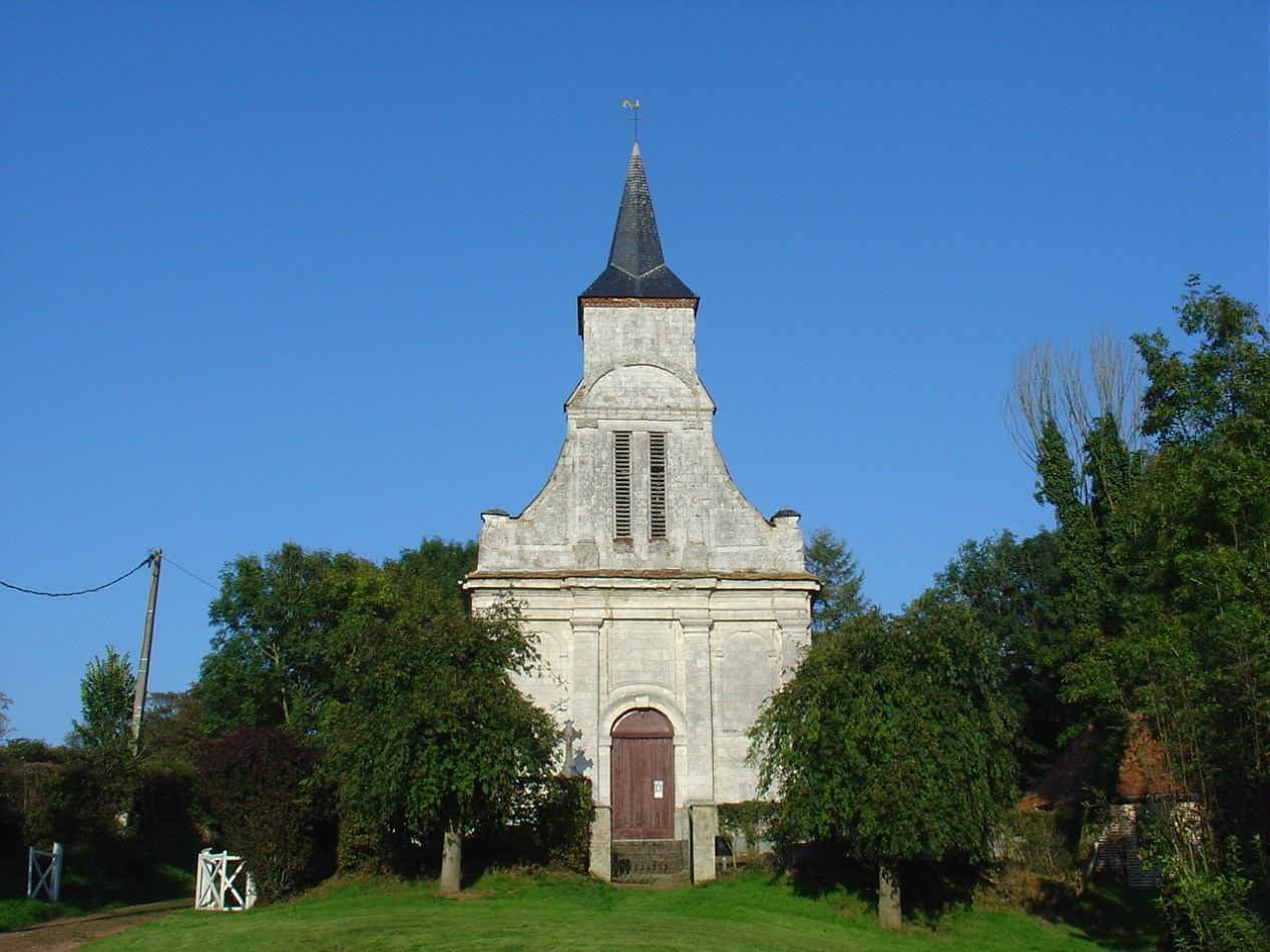 Église de Neulette